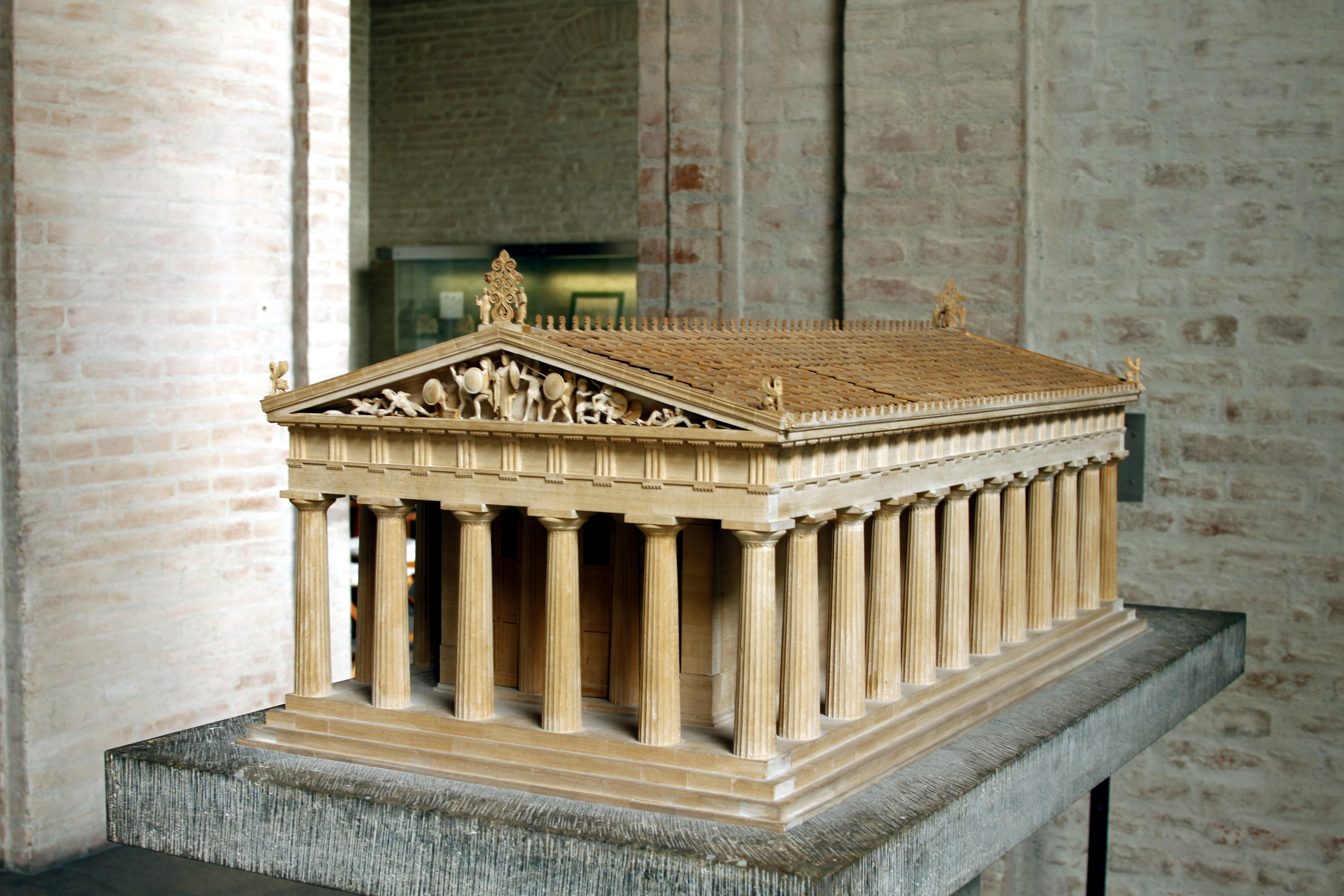 Temple of Aphaia in Egina - Glyptothek - Munich - Germany